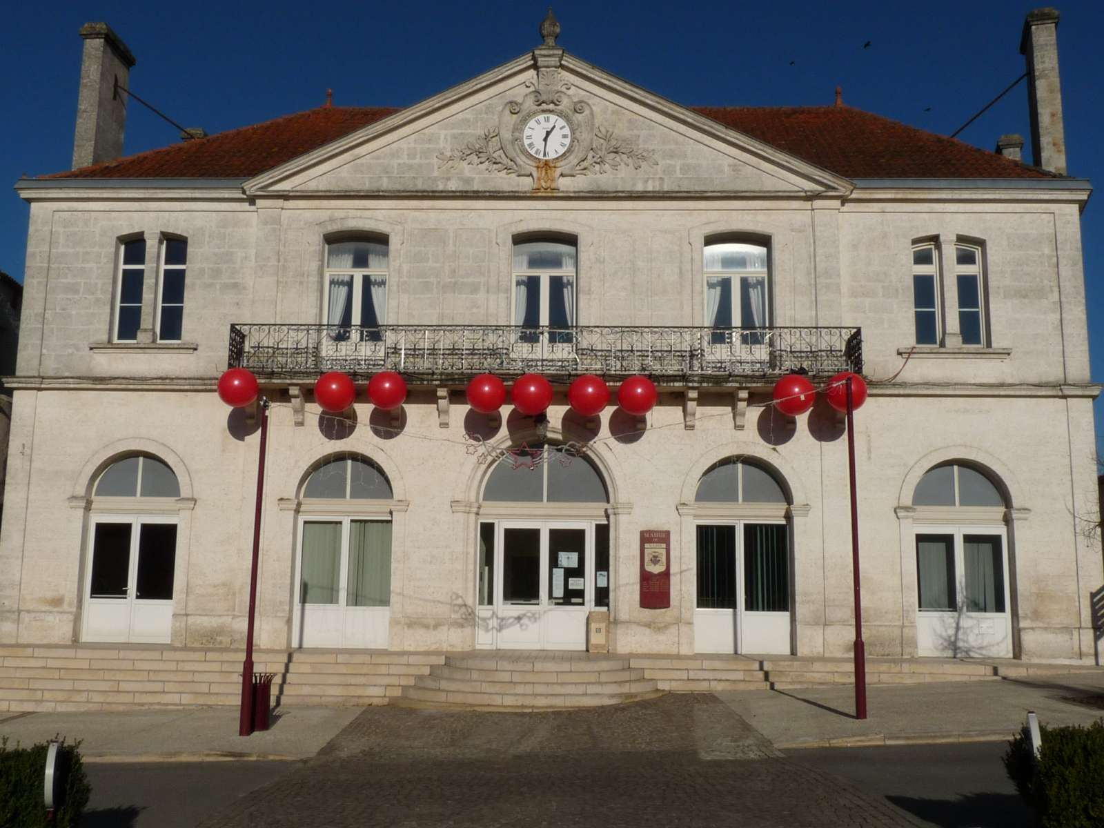 mairie de Vars, Charente, France